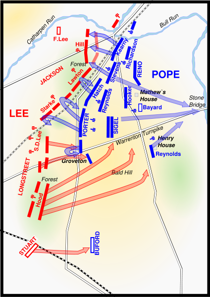 andet slag ved Bull Run